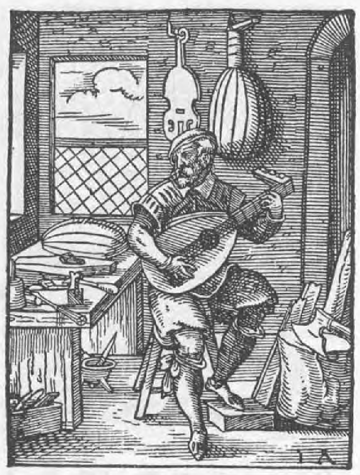 "Der Lautenmacher" aus Eigentliche Beschreibung aller Stände auf Erden (1568)